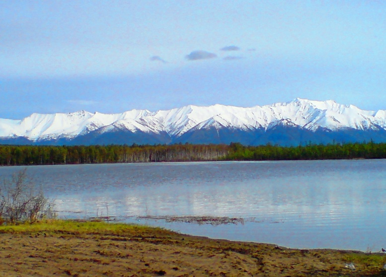 Озеро и горы